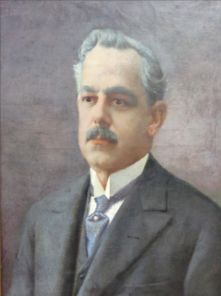 Francisco Marques de Góis Calmon, governador da Bahia, de 1924 a 1928, em retrato a óleo de autoria desconhecida exposto no Memorial dos Governadores, da Fundação Pedro Calmon – Centro de Memória e Arquivo Público da Bahia, da Secretaria de Cultura do Estado da Bahia.